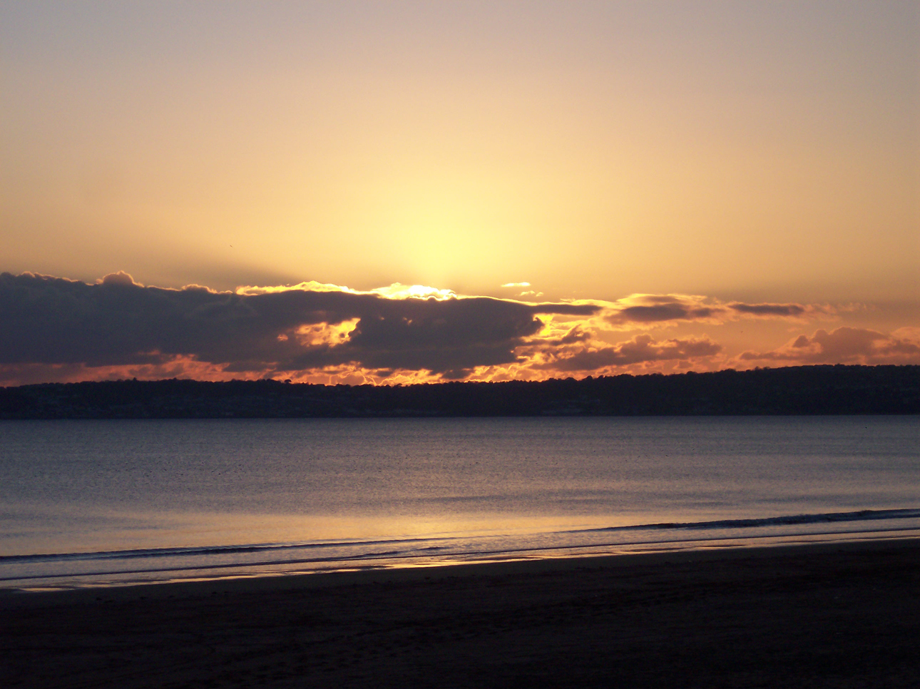 Sunset over Swansea Bay